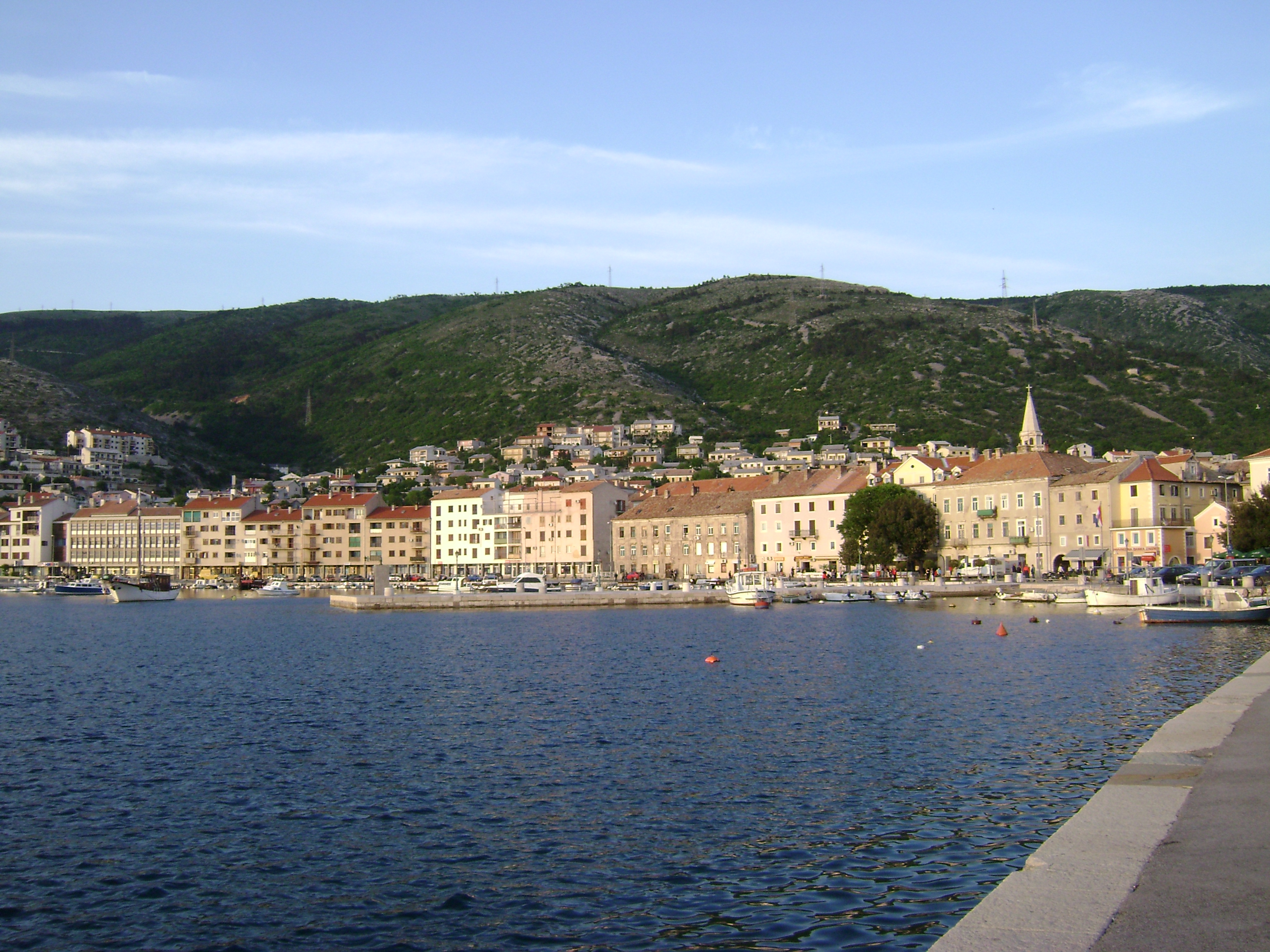 Panorama Senja u proljeće 2008.